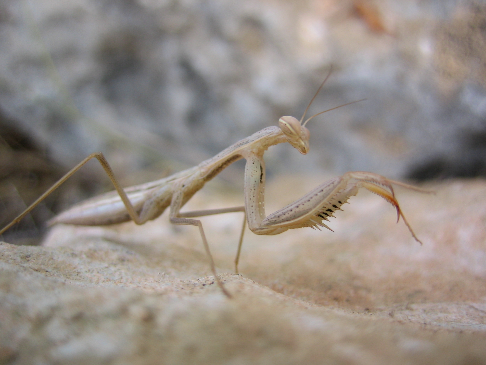 Gottesanbeterin